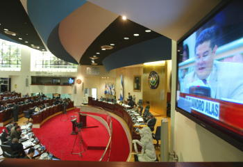 Vista panorámica del Salón Azul del palacio legislativo